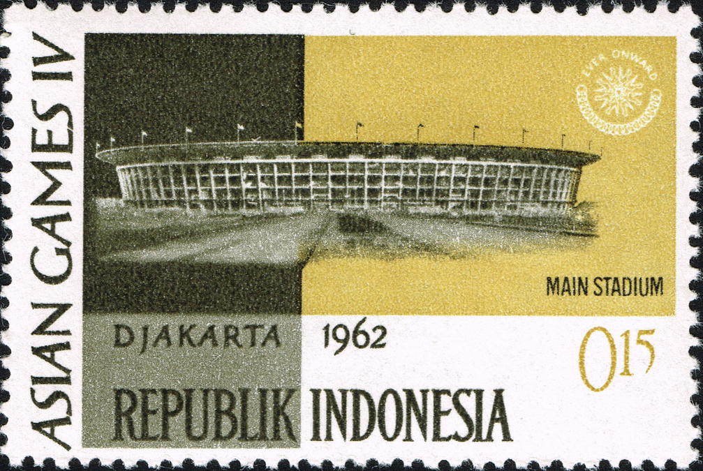 Asian Games IV